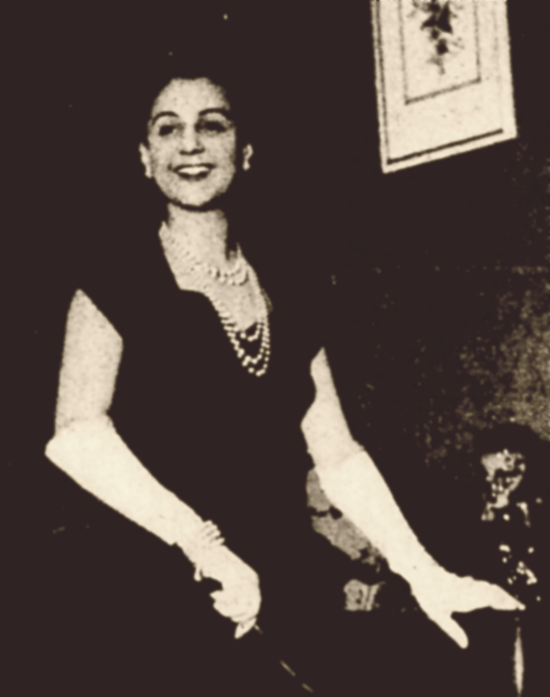 A atriz húngaro-brasileira Eva Todor em 1944, pela "Revista da Semana".